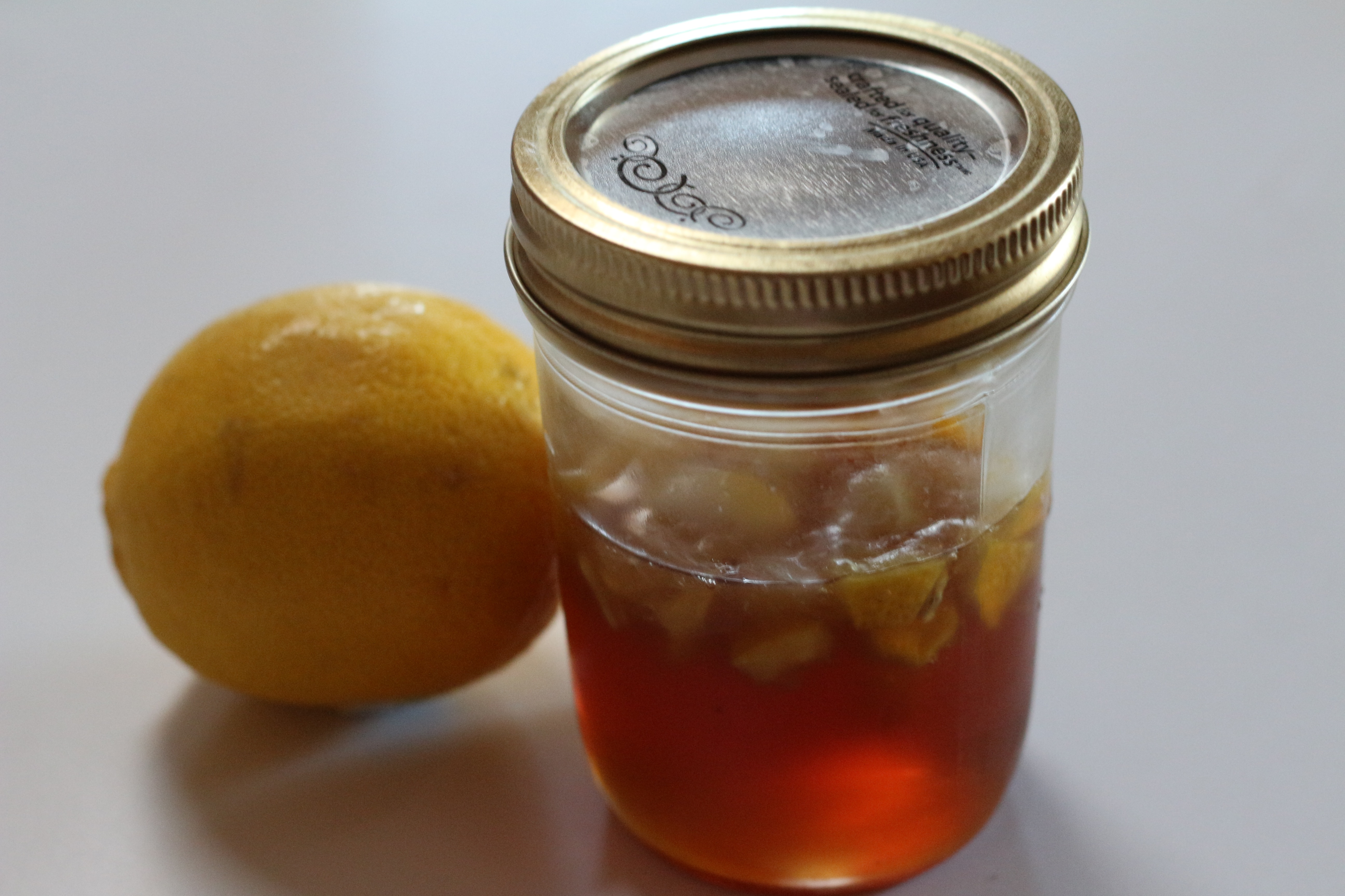 蜂蜜柠檬